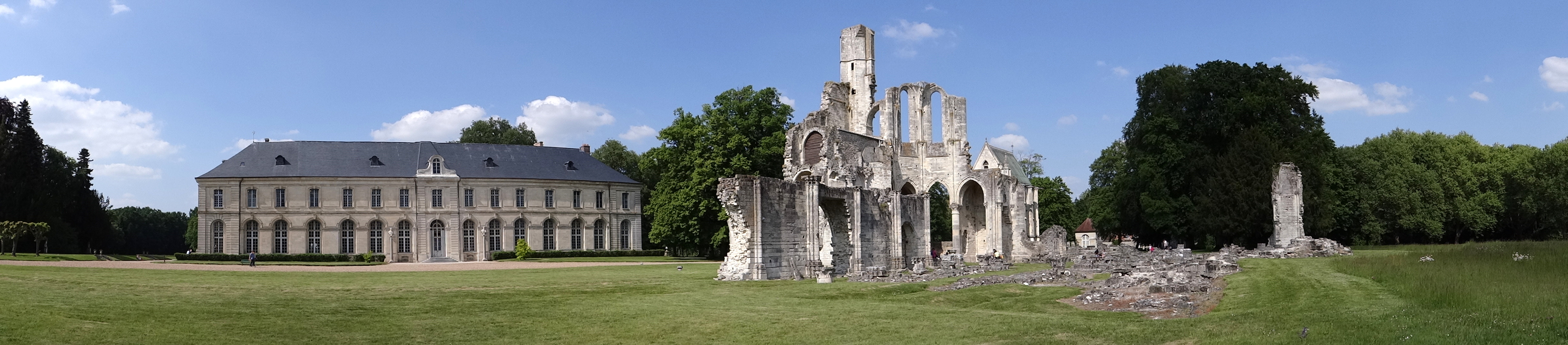 Ruine de l’abbatiale de l'abbaye royale de Chaalis (à droite). Chapelle (derrière l'abbatiale). Château de Chaalis (à gauche). Fontaine-Chaalis, 20 mai 2018 .